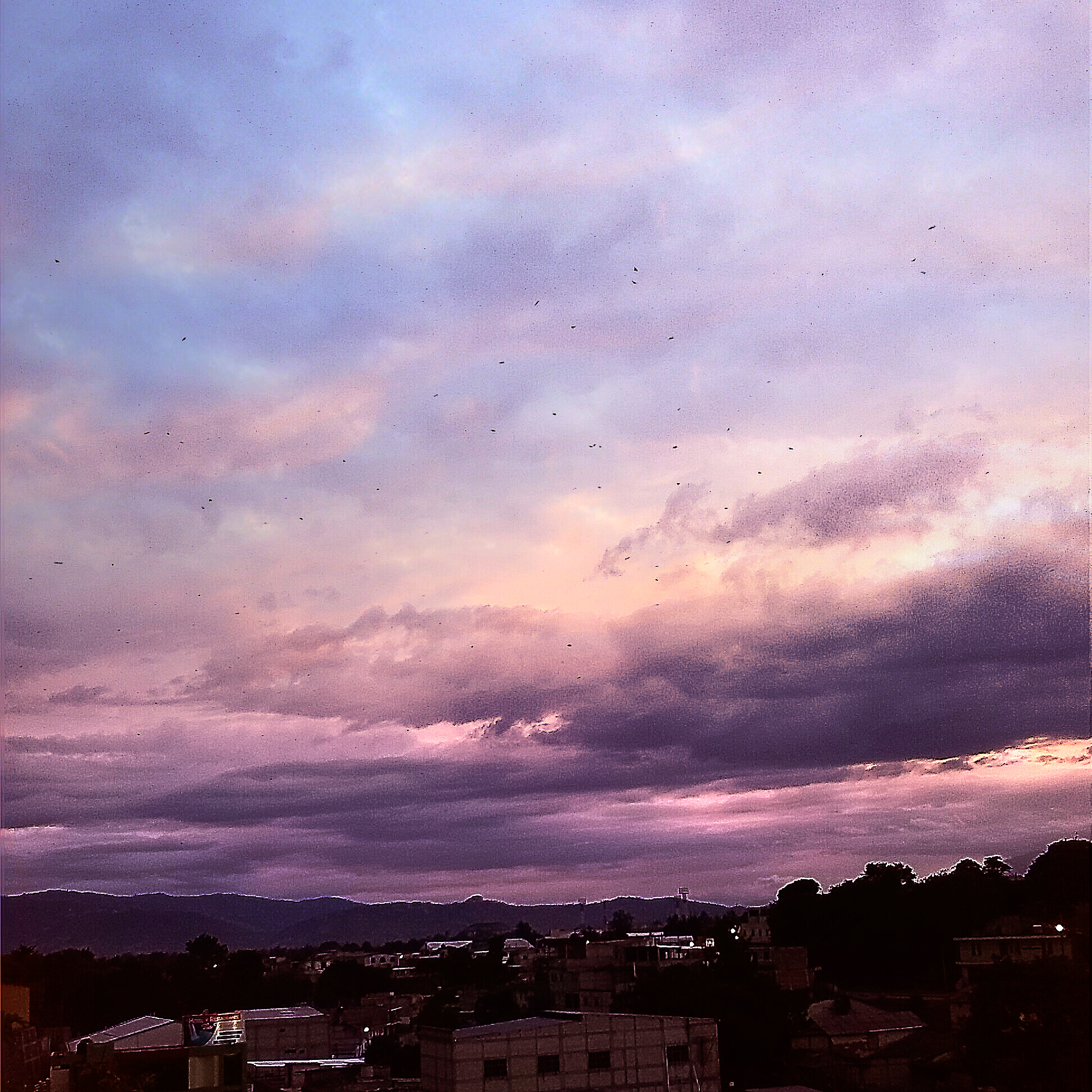 Paisajes de Cuilco